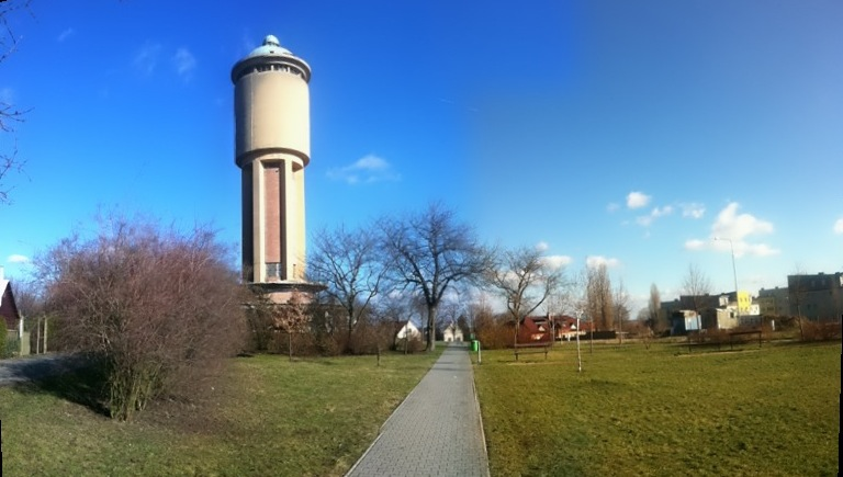 březen 2013